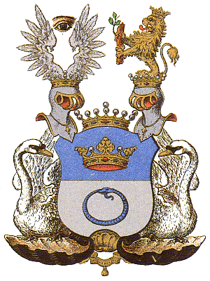 Vaakuna